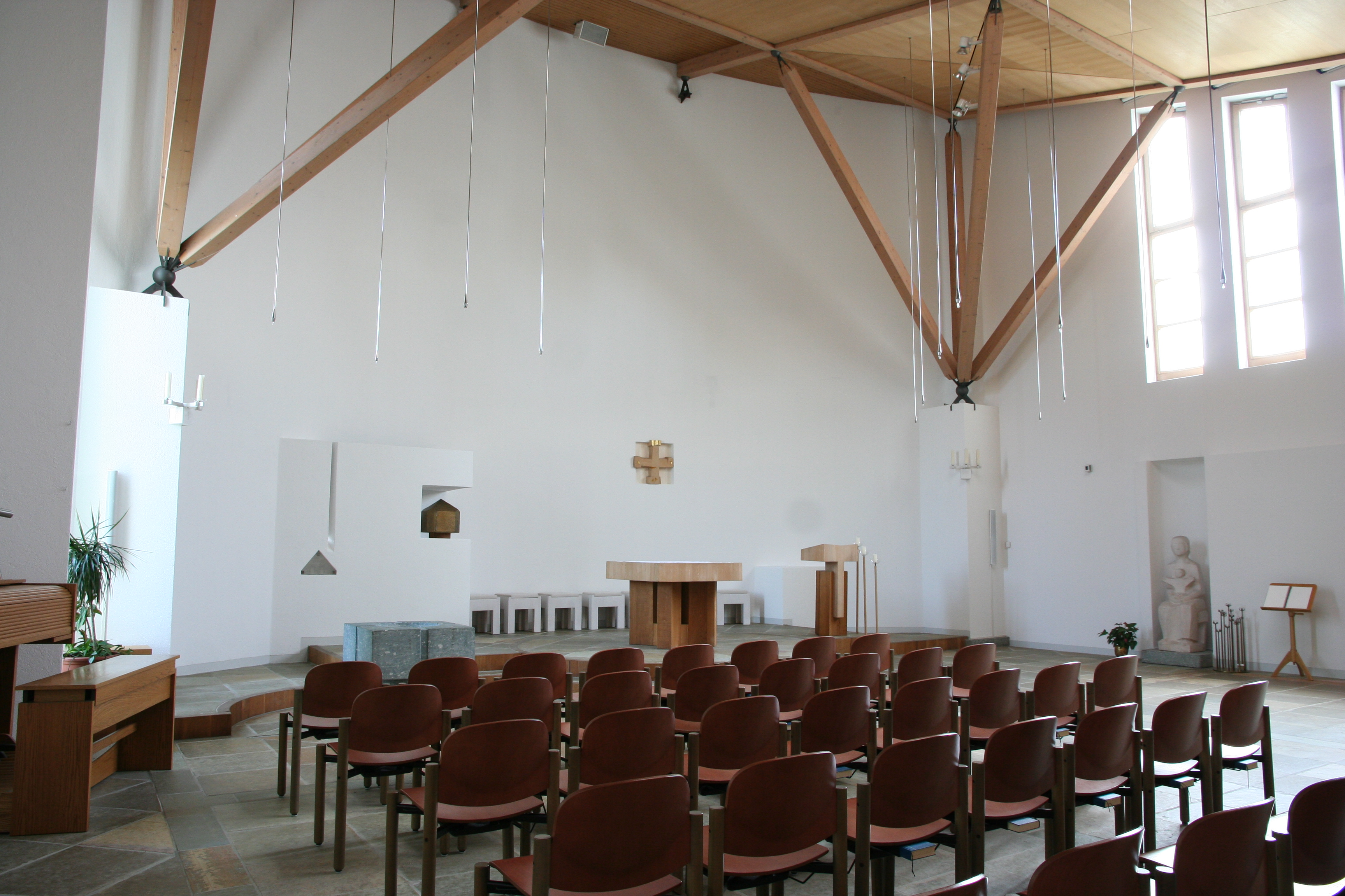 Römisch-katholische Pfarrkirche Maria Magdalena Rafz, Gestaltung von Alois Spichtig